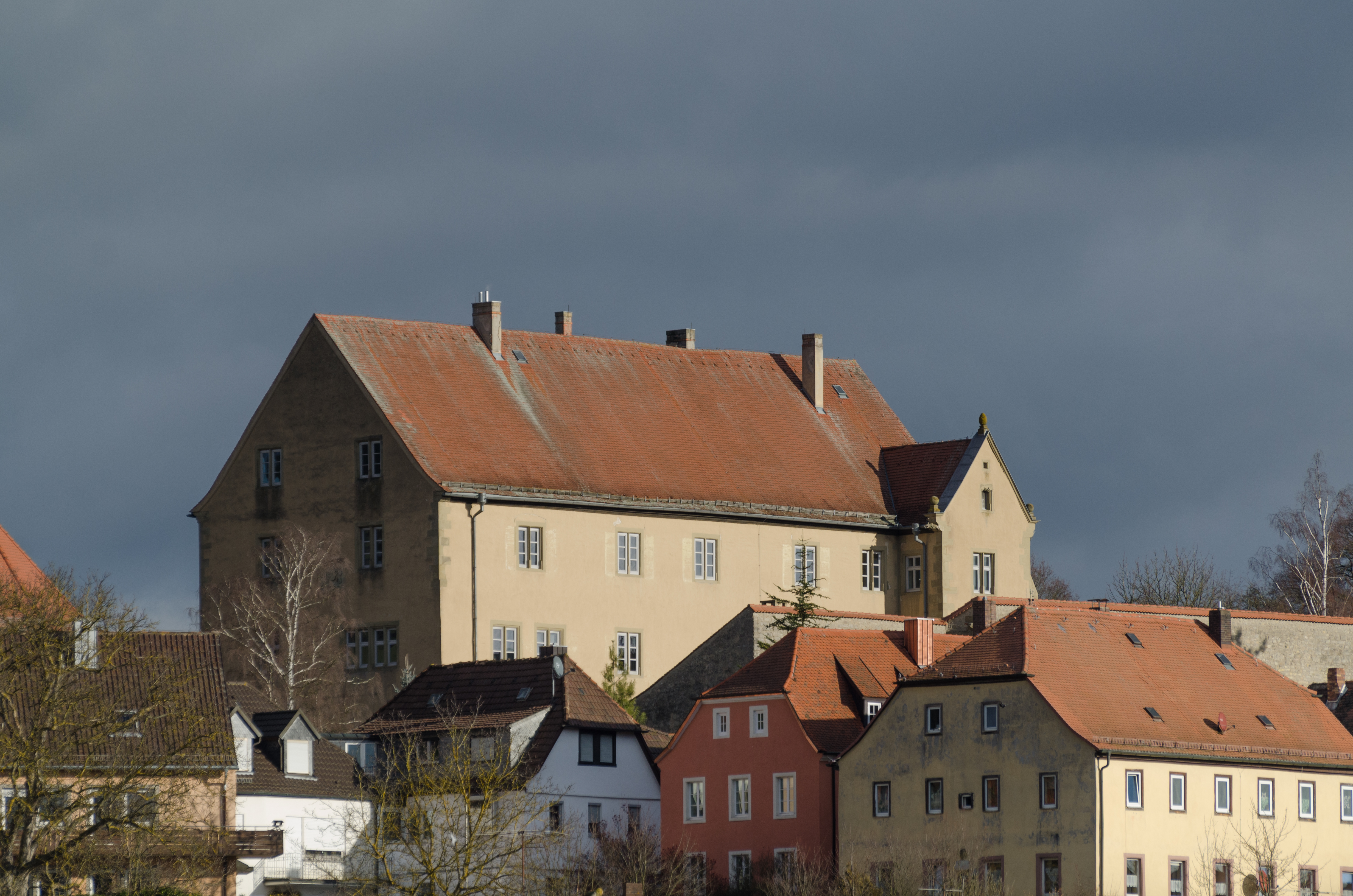 Arnstein, Kirchberg 23